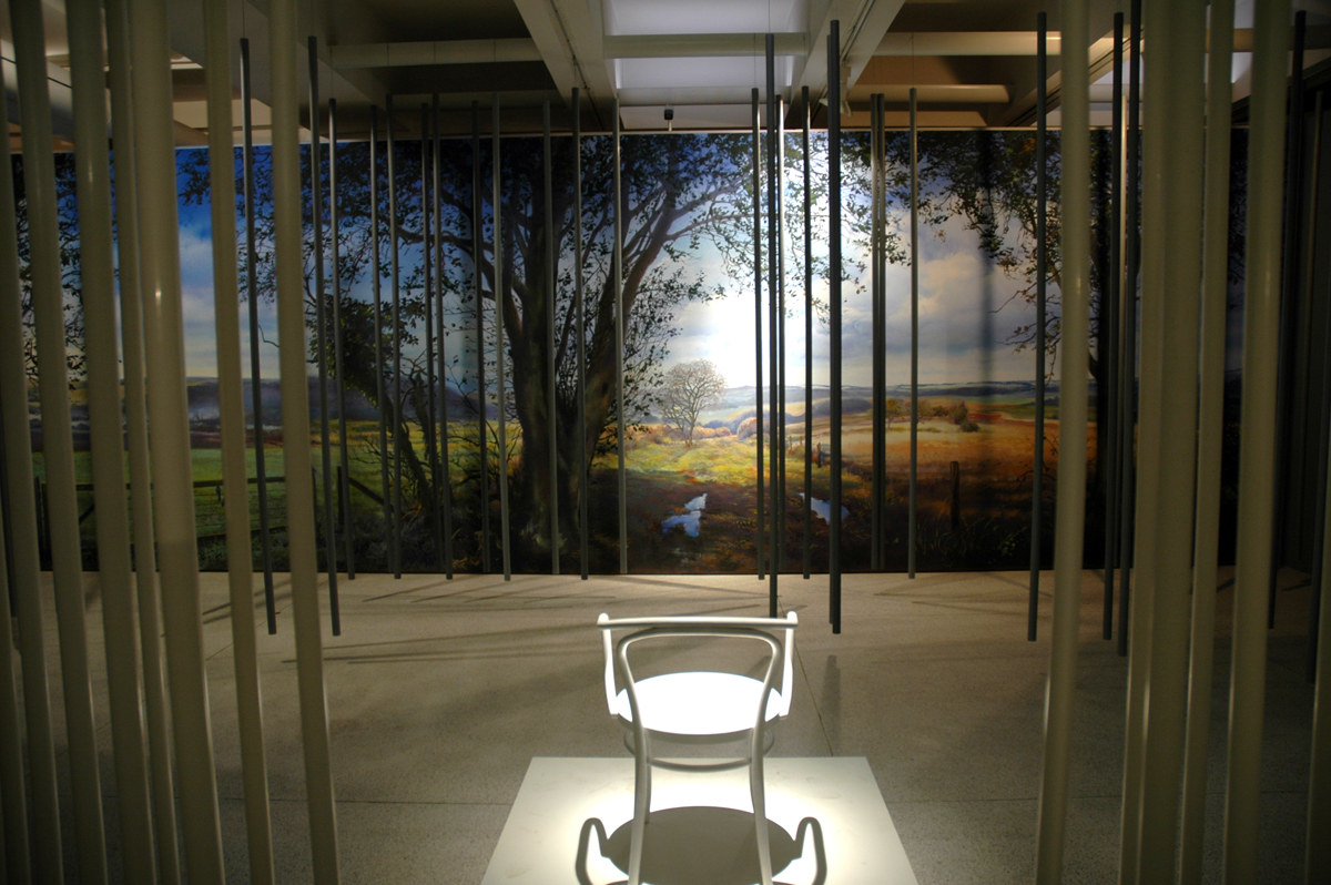 Theodor Pištěk, Konec lesa, instalace Národní galerie Praha, 2012